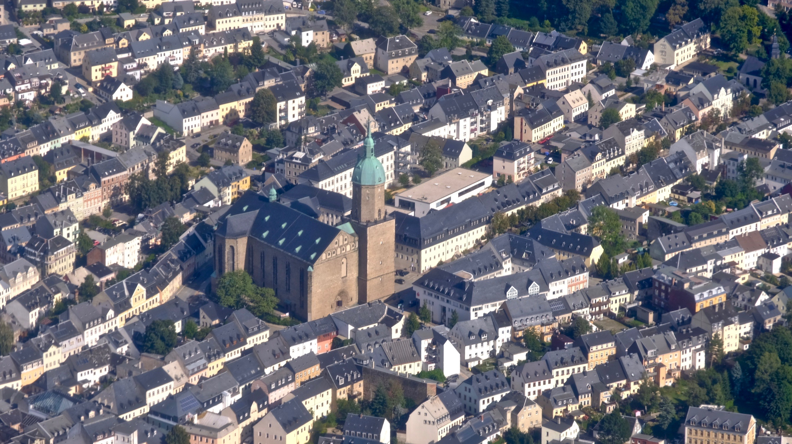 St. Annenkirche Annaberg Buchholz, Luftbild.